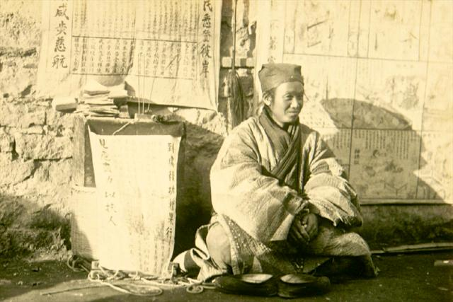 济南老照片